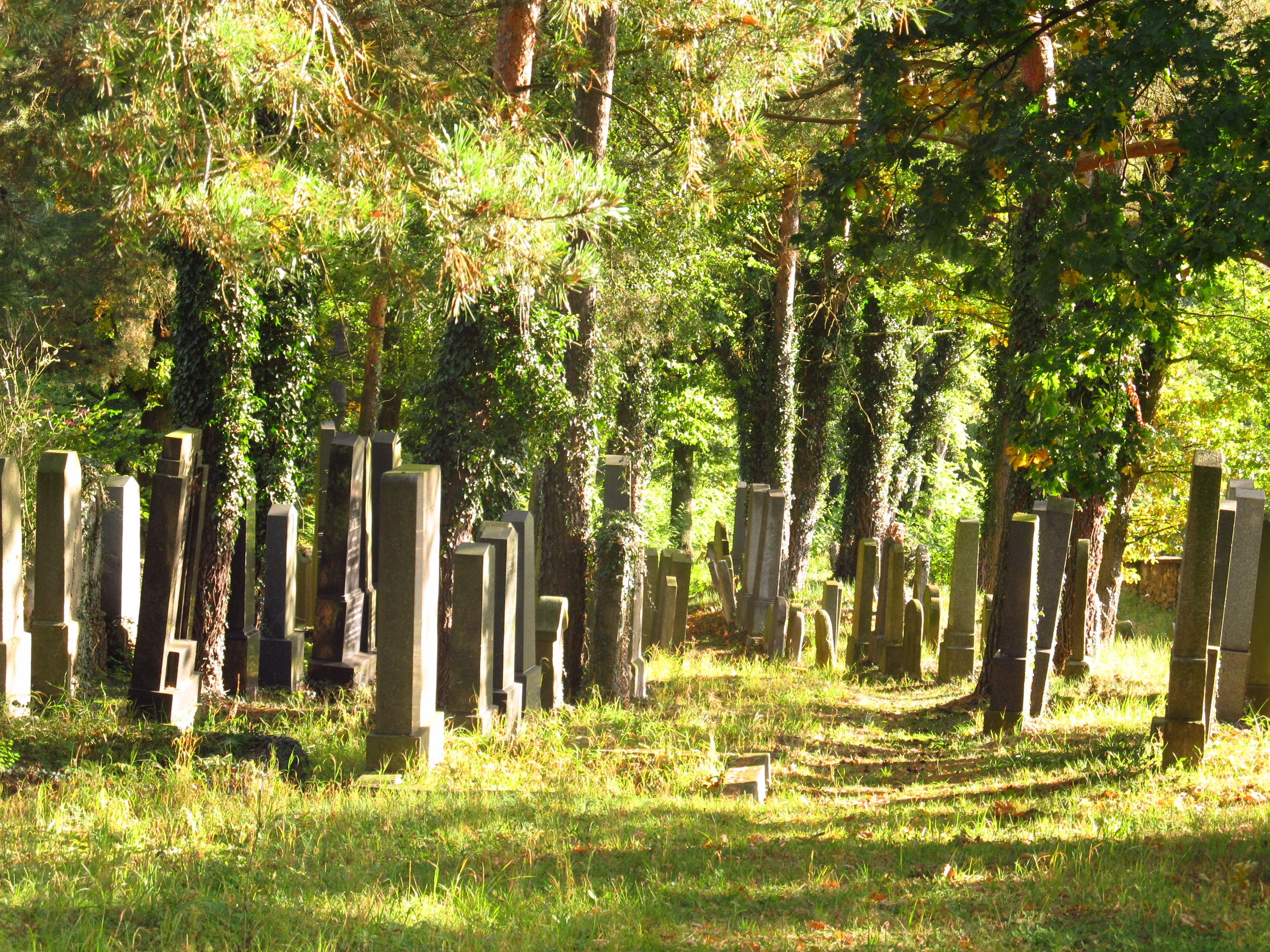 Židovský hřbitov (Trhový Štěpánov), J od obce, Trhový Štěpánov